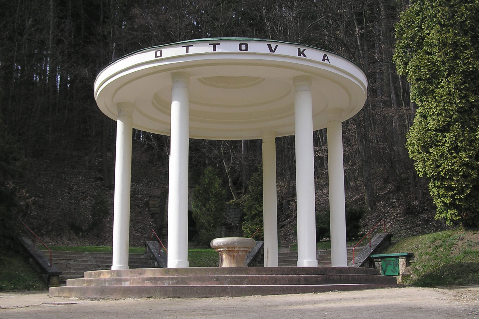 Luhačovice - pramen Ottovka, nový pavilon